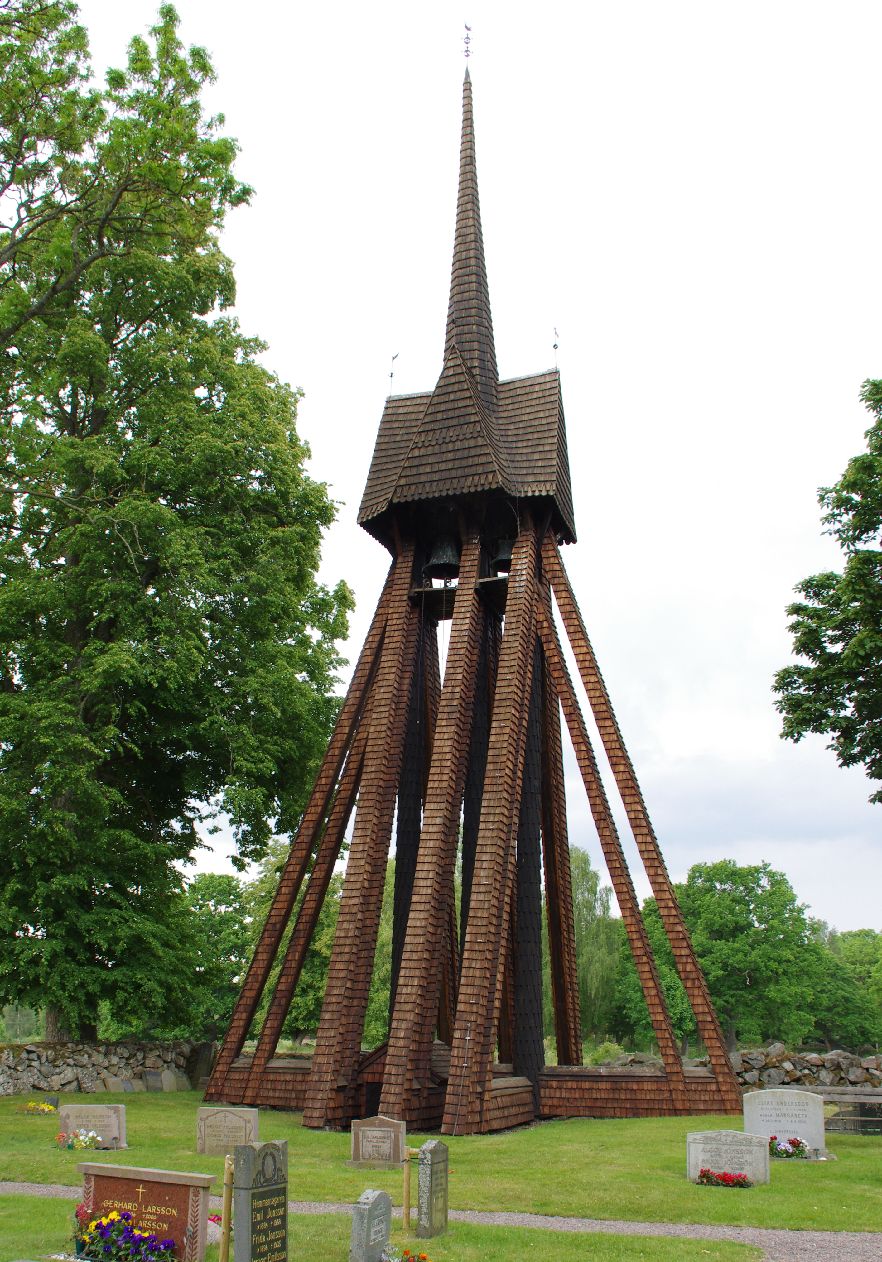 Klockstapel